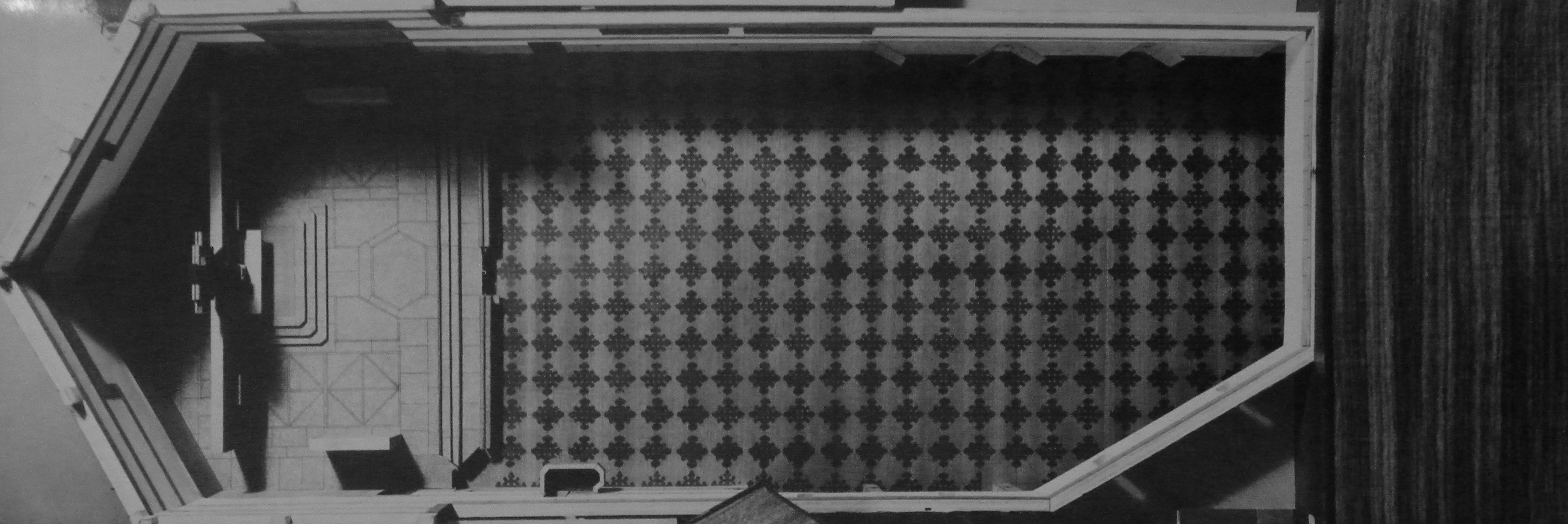 Modello originale della Chiesa di San Gabriele Arcangelo in Mater Dei.